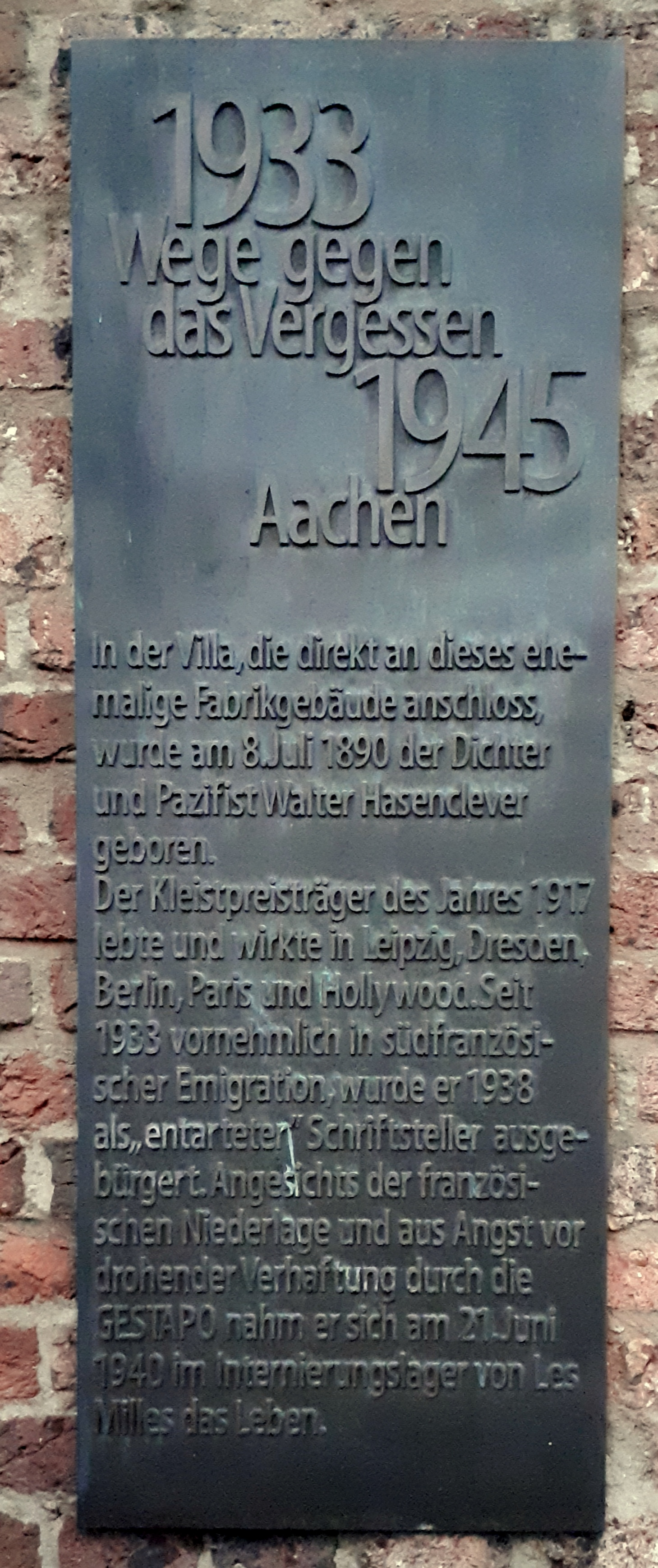 Gedenktafel im Rahmen "Wege gegen das Vergessen" an der Barockfabrik in Aachen für Walter Hasenclever, der in unmittelbarer Nachbarschaft geboren wurde